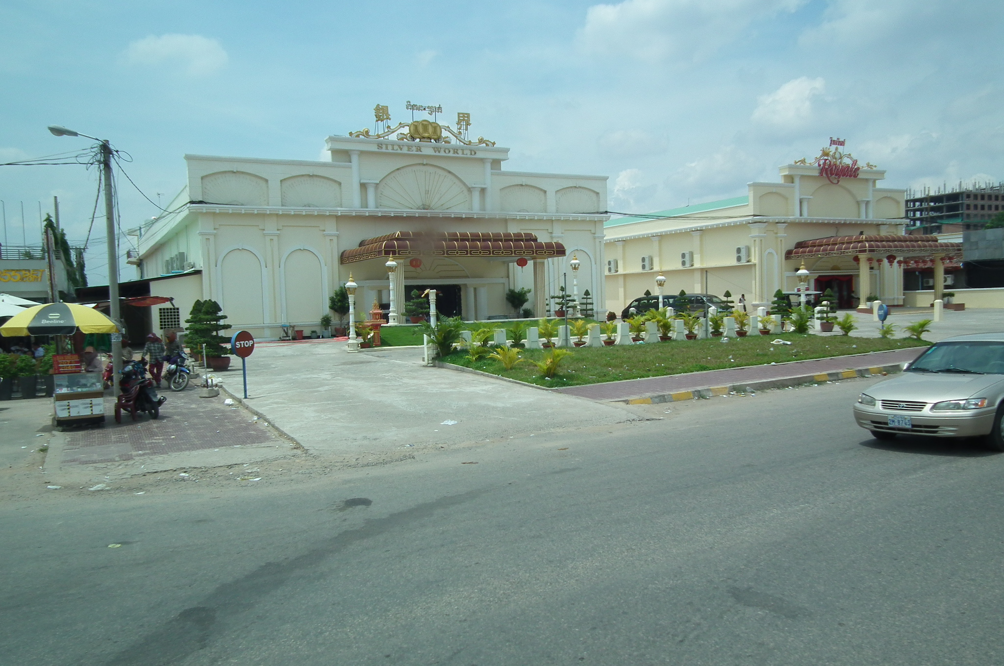 Massage parlor of Svay Rieng カンボジア南東部 国境の町スバイリエン州バベットのマッサージパーラー